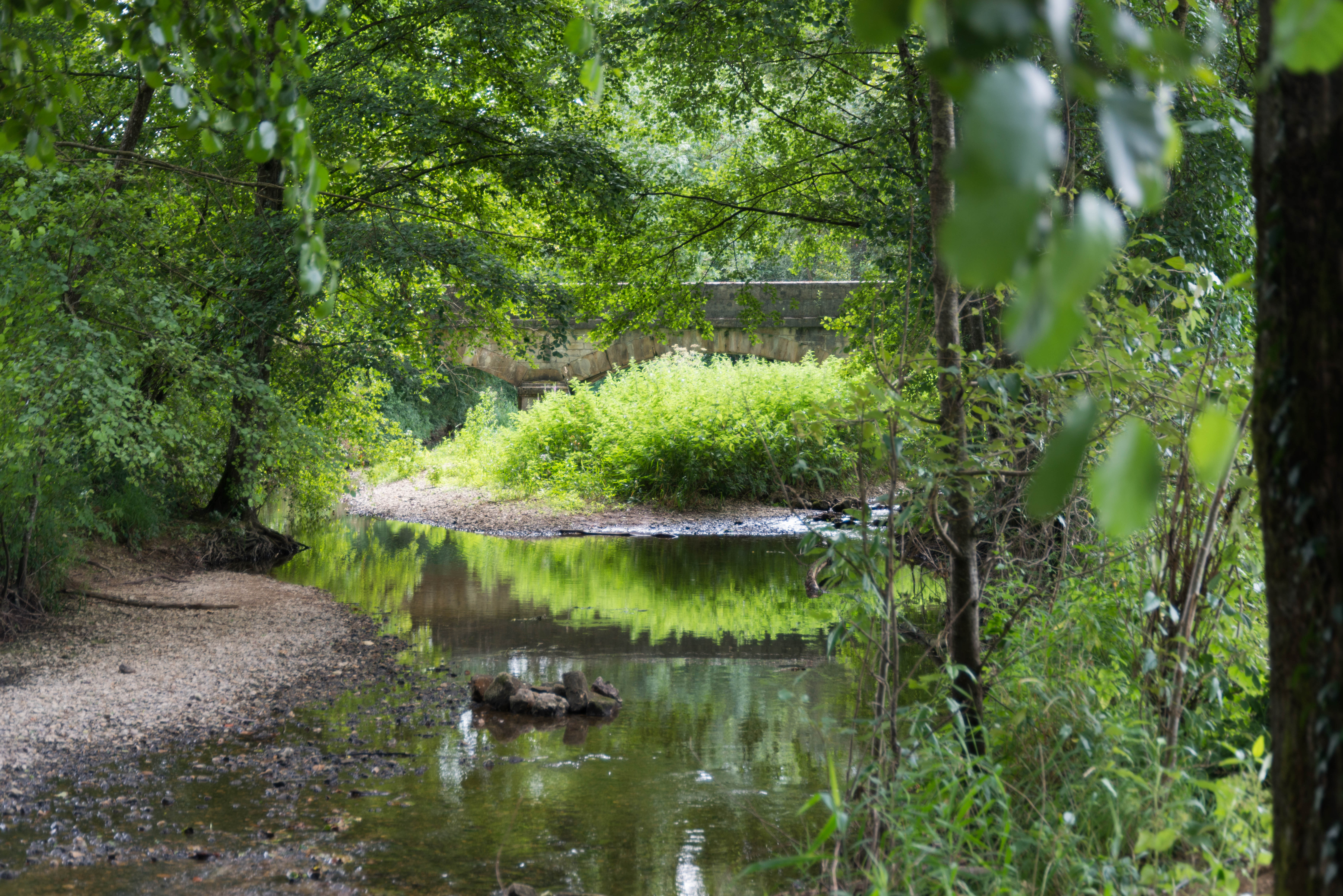 Lavincourt - Bords de la Saulx